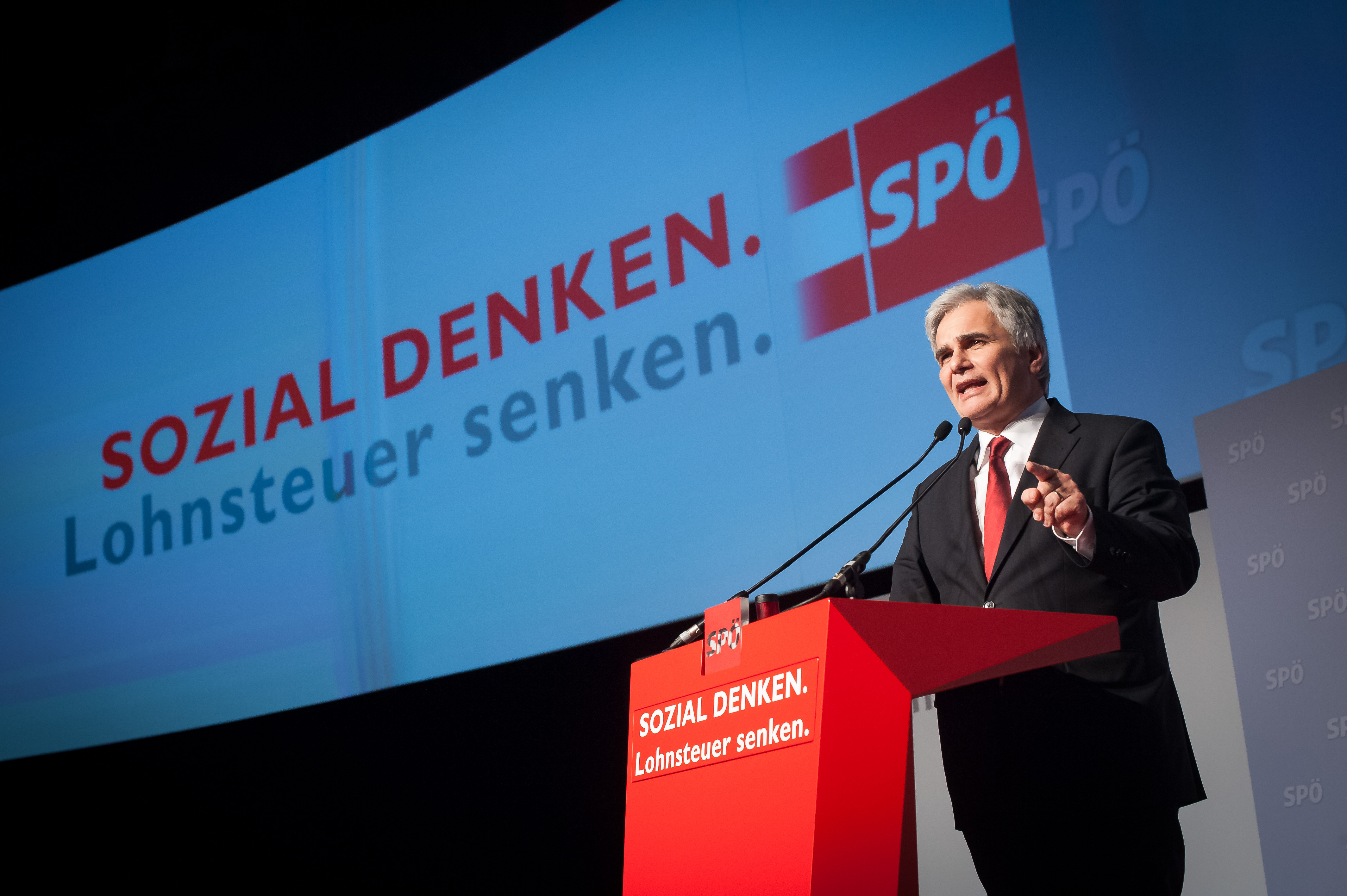 Foto: Thomas Lehmann 43. Bundesparteitag der SPÖ, vom 28. und 29. November 2014 in der Messe Wien.